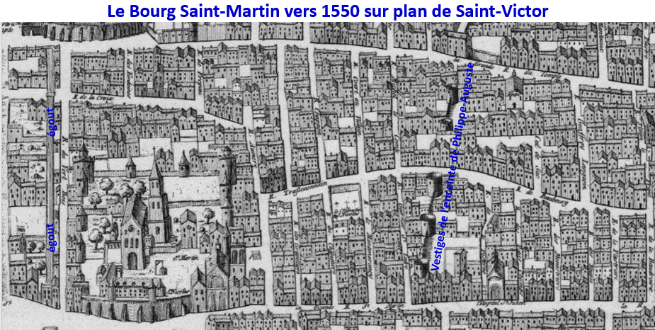 Bourg St-Martin vers 1550 sur plan de Saint-Victor